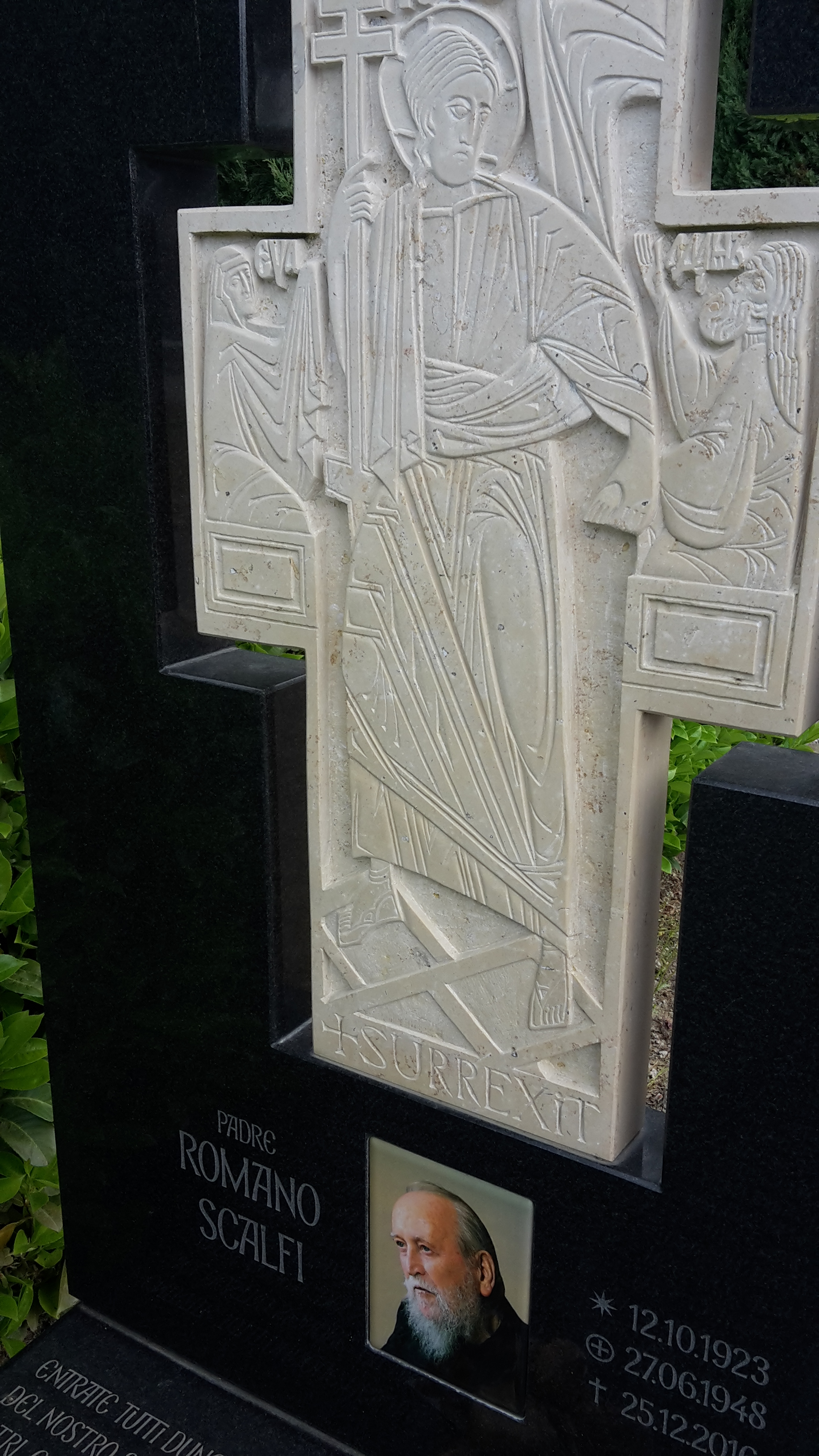 Кладбище Сериате, надгробие священника Романо Скальфи